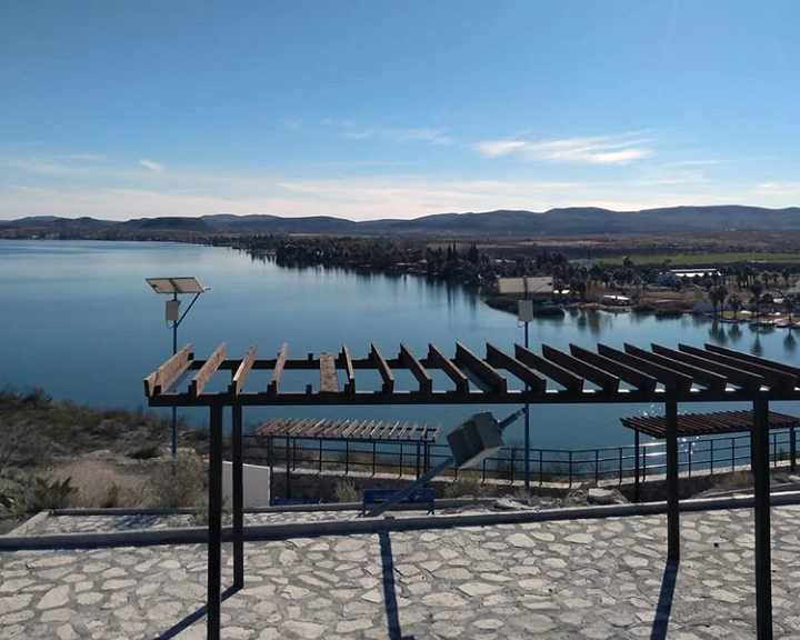 Parque El Mirador en Lago Colina, municipio de San Francisco de Conchos, Chihuahua.